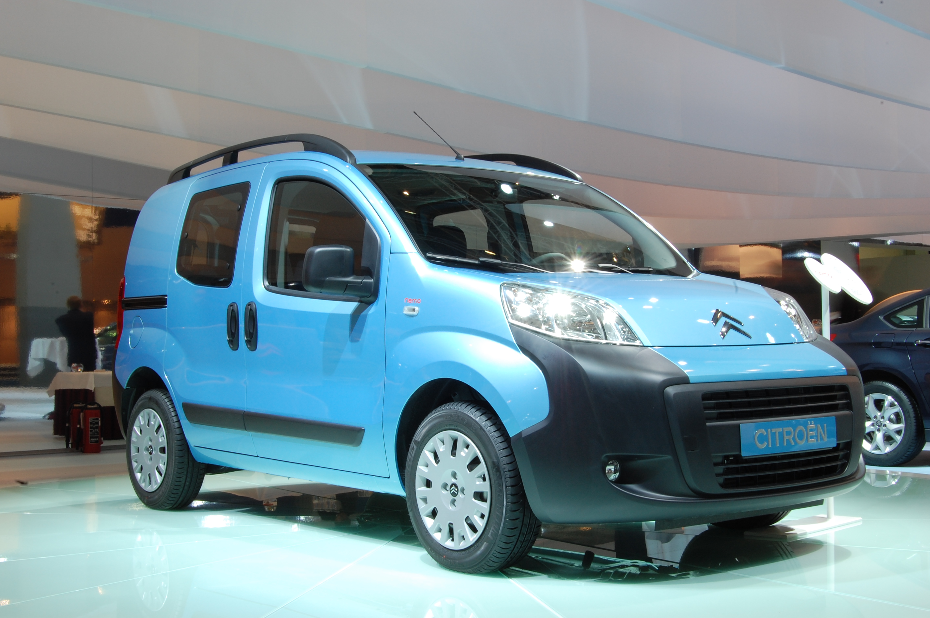 CITROEN Nemo Combi au Salon de Bruxelles